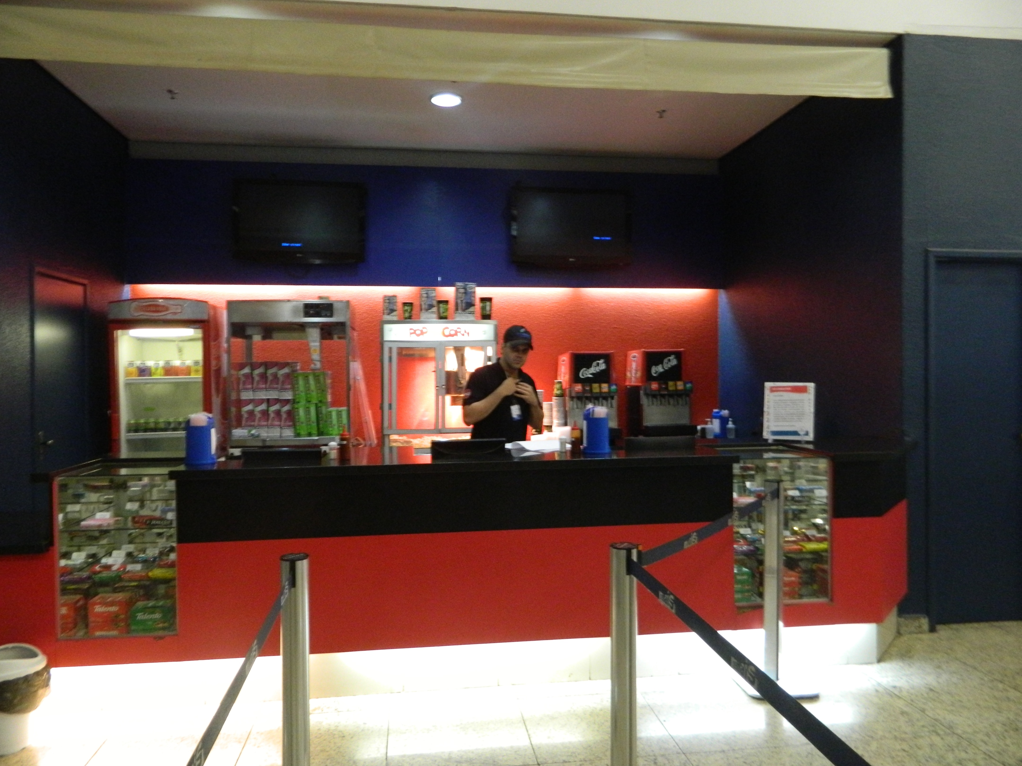 Bomboniere do Cinemais Patos de Minas